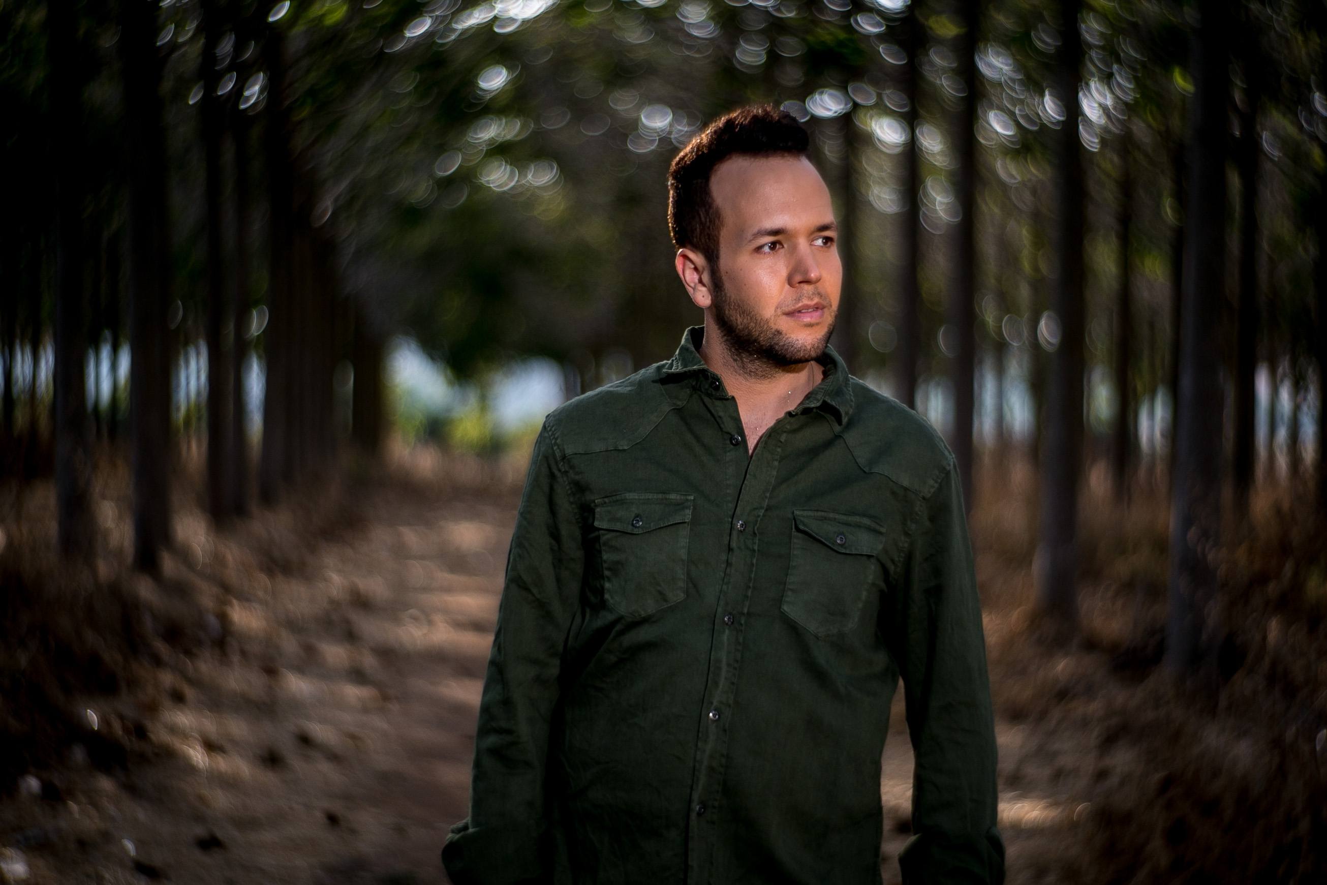 מתוך צילומים לאלבום הבכורה צלם: סאלי פטל